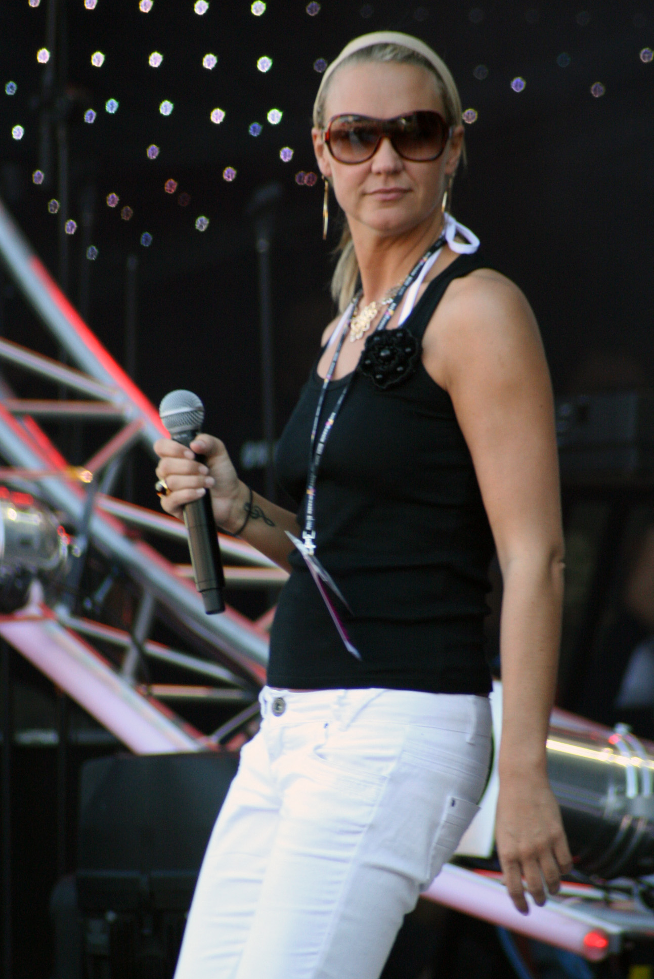 Kate Ryan, koncert "Hity na czasie” - The Tall Ships' Races, Szczecin 2007